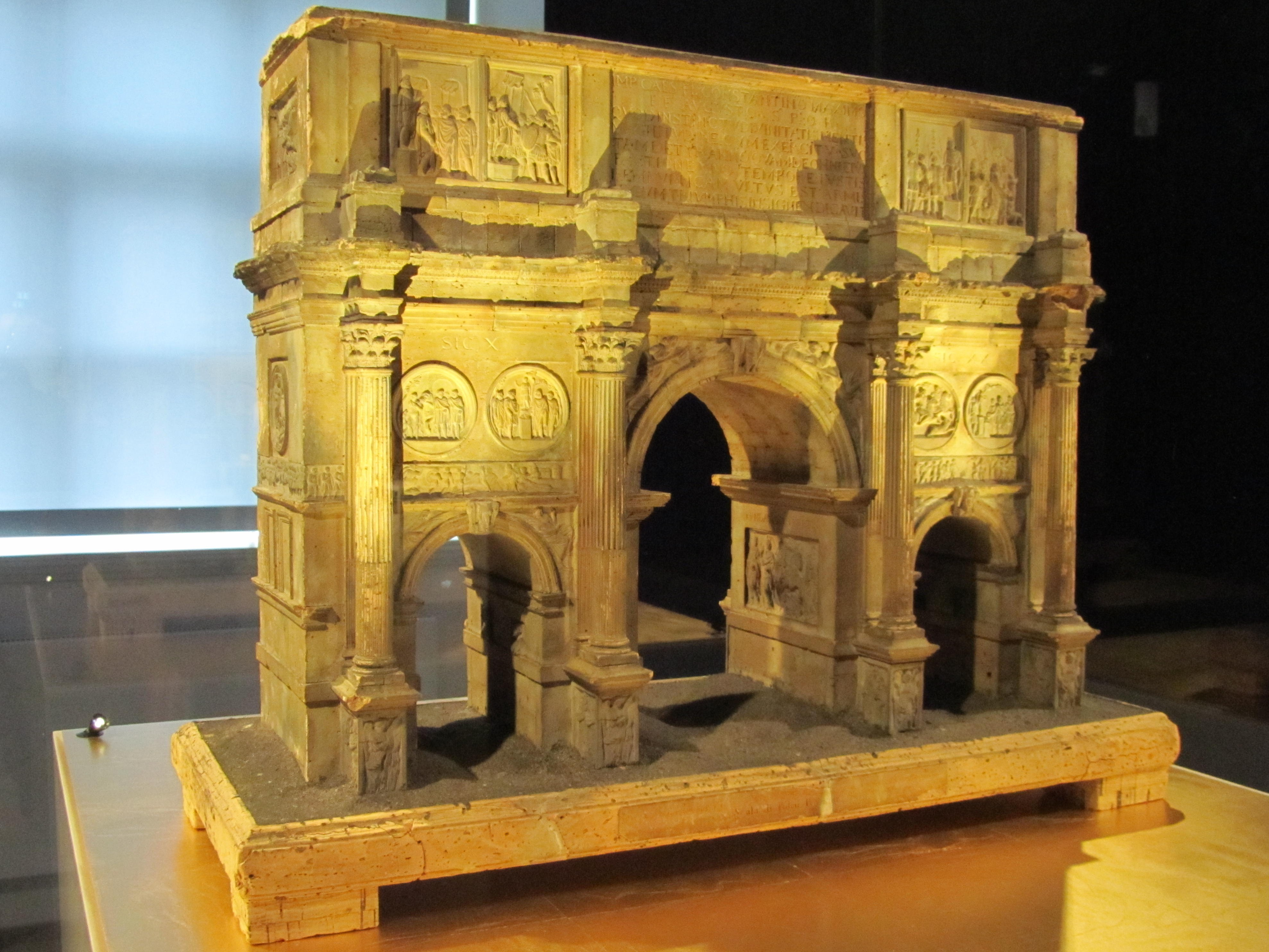 Modell des Konstantinsbogens aus Kork, Rom, 3. Viertel 18. Jahrhundert, ausgestellt im Herzoglichen Museum Gotha (Thüringen).